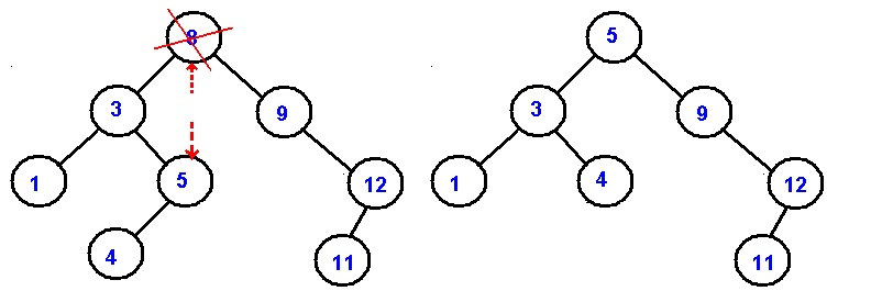 primjer brisanja čvora